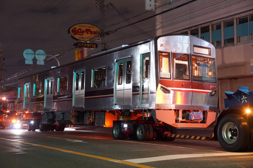 北大阪急行9000形列車の輸送時の写真です